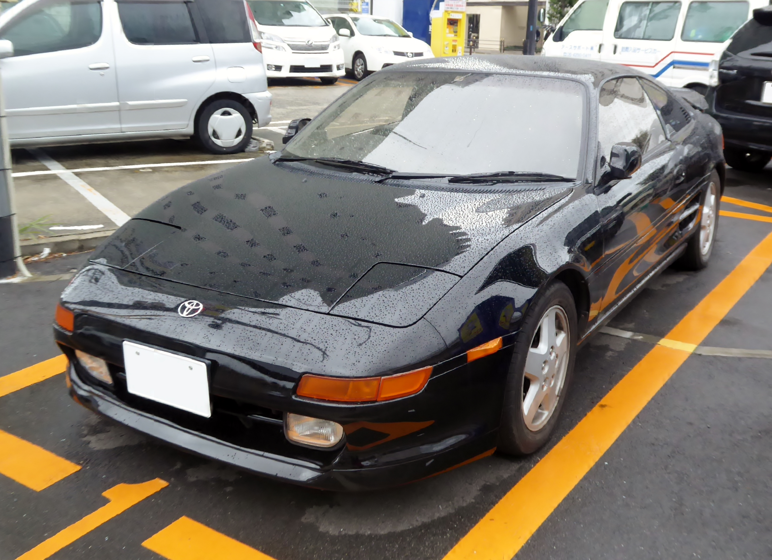 E-SW20型トヨタ・MR2 G-LIMITEDをフロントから撮影。